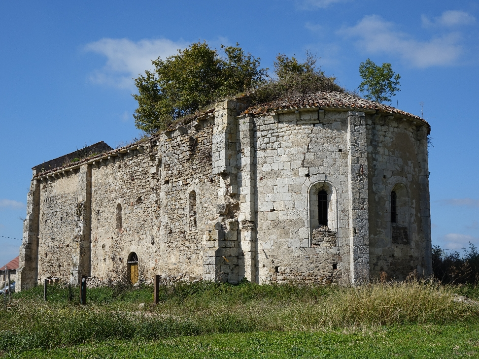 Chapelle de Reugny (état en septembre 2014) .